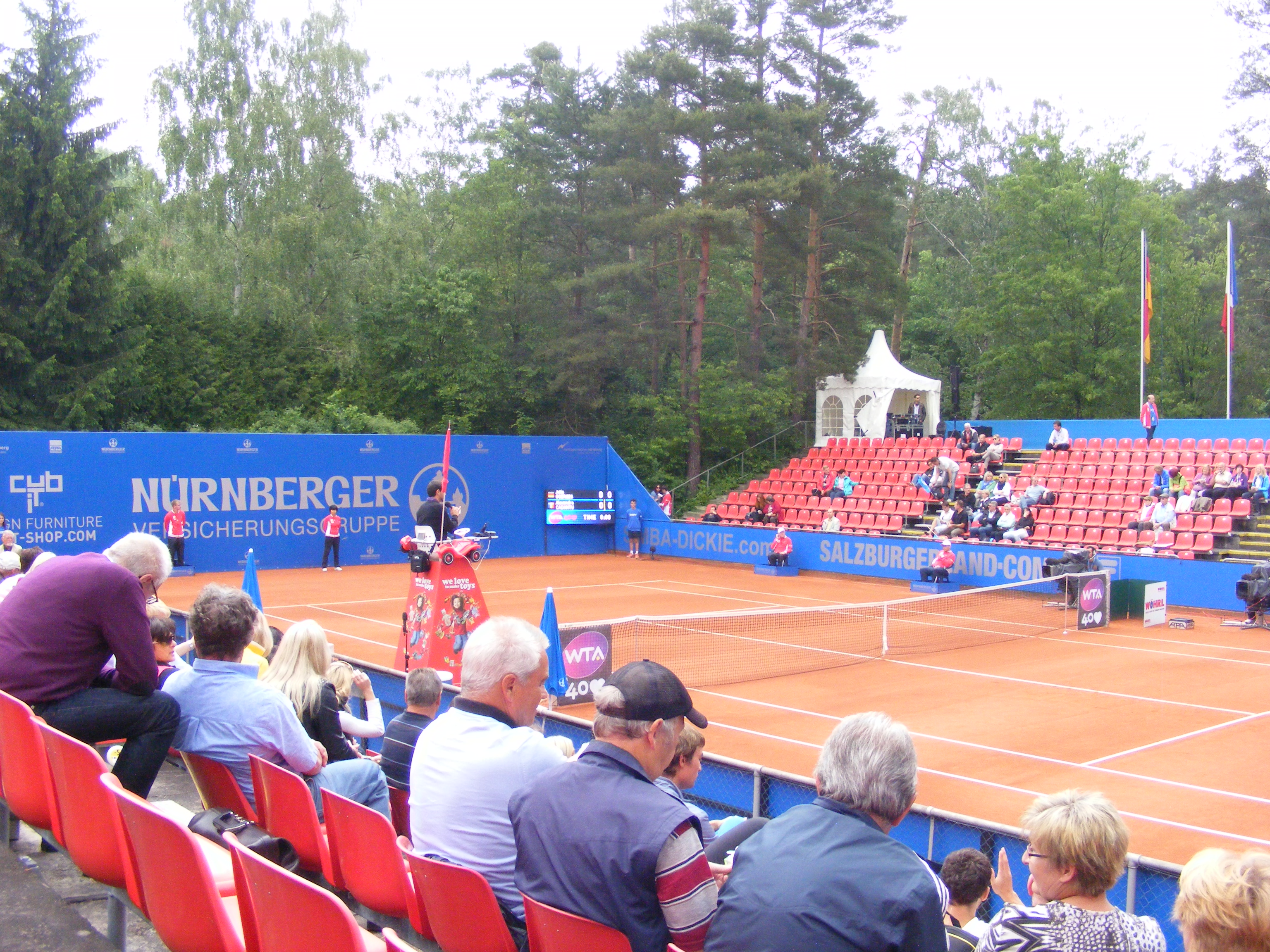 Center Court des WTA World Tour International Turniers "Nürnberger Versicherungscup 2013"